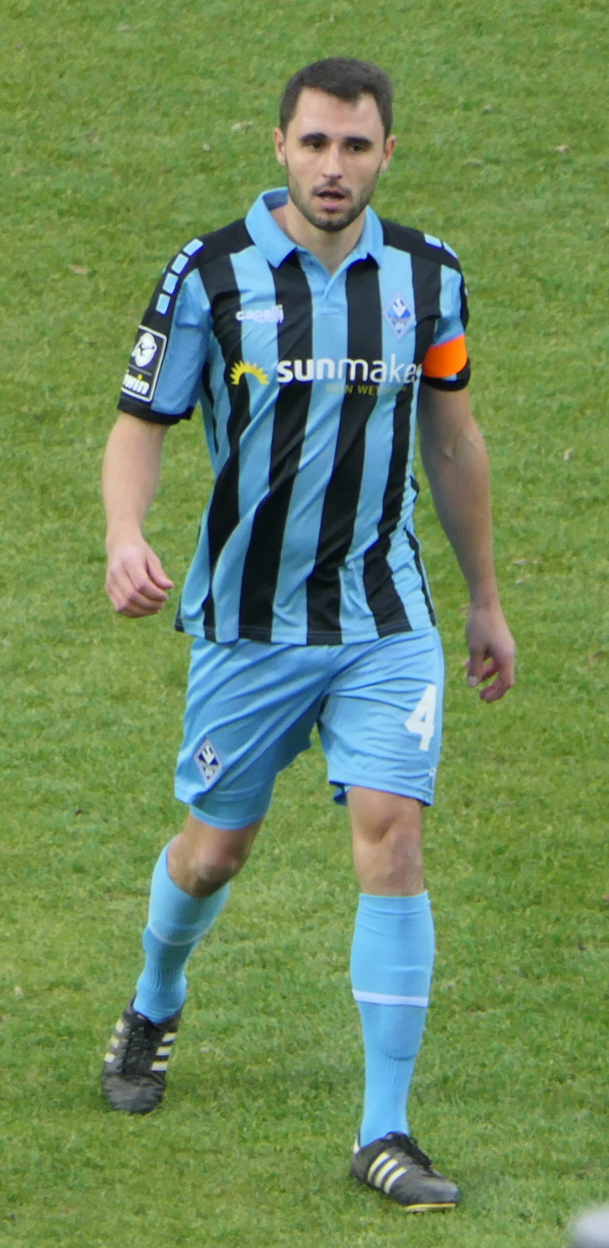 Der Fussballprofi Kevin Conrad im Trikot vom SV Waldhof Mannheim beim Heimspiel gegen Eintracht Braunschweig am 08.12.2019.